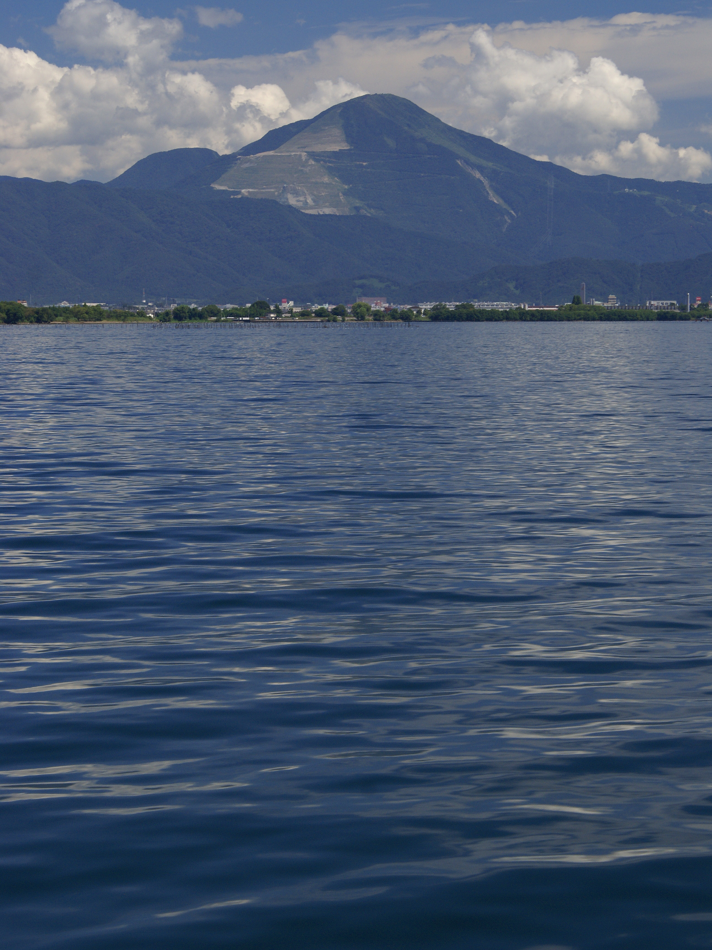 Mt. Ibuki (Ibukiyama) in Nagahama, Shiga, Japan